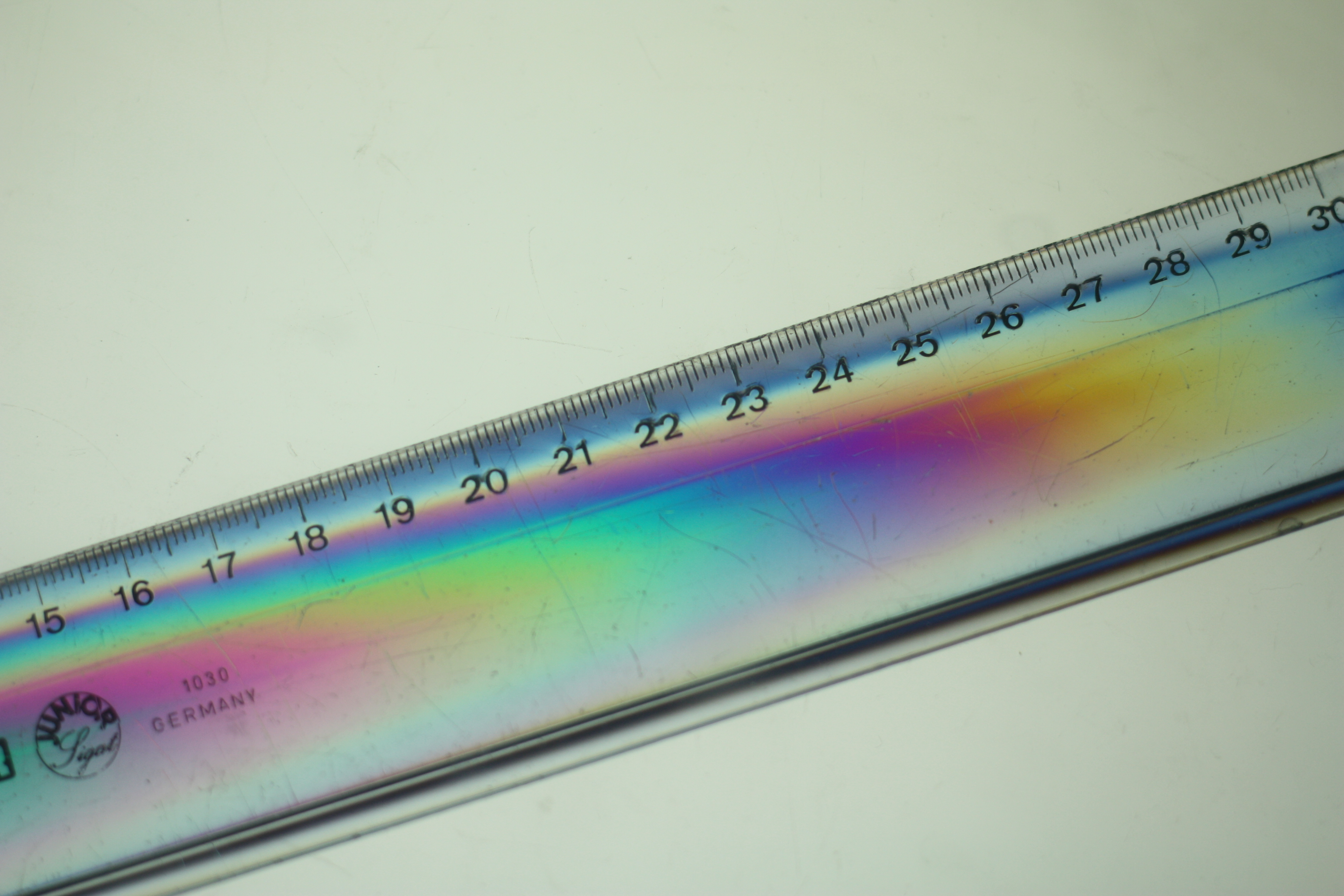 transparentes Lineal zwischen zwei Polarisationsfiltern - macht die Spannungslinien sichtbar; die Materialspannung wird druch intensive Färbung sichtbar; Spannungsoptik; Universum Bremen